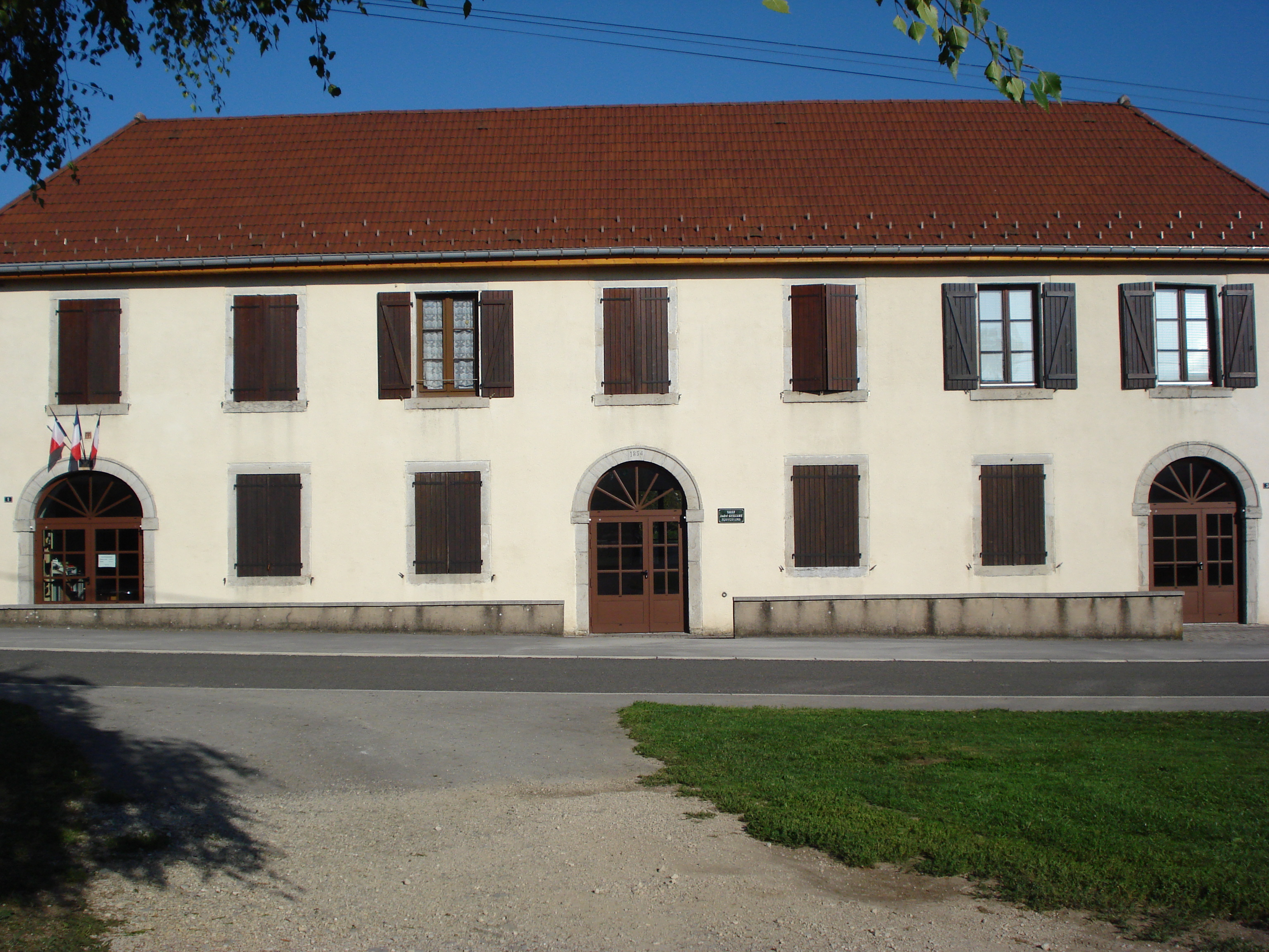 Mairie de Durnes, France. Vue d'ensemble du bâtiment.